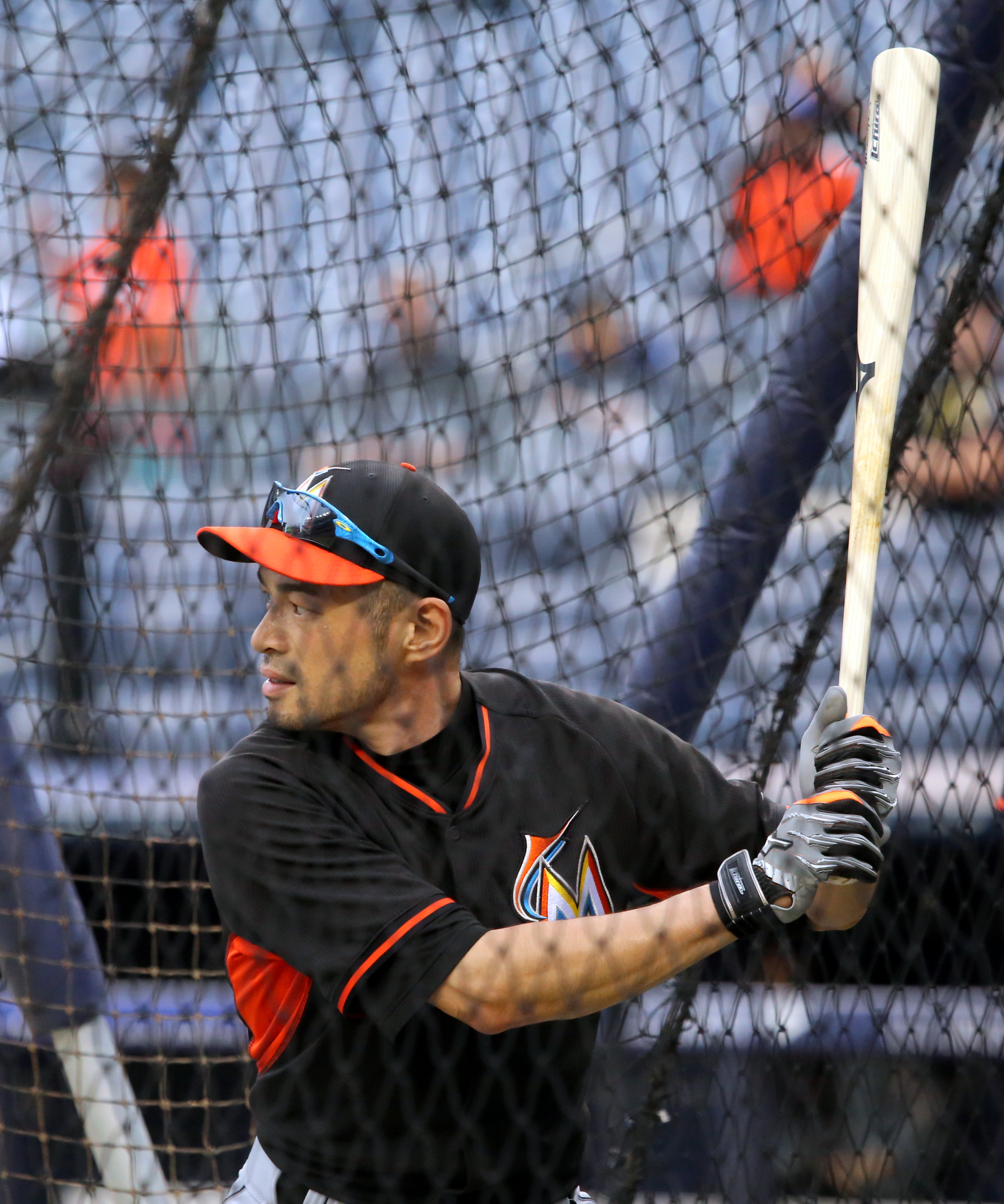 Ichiro Suzuki